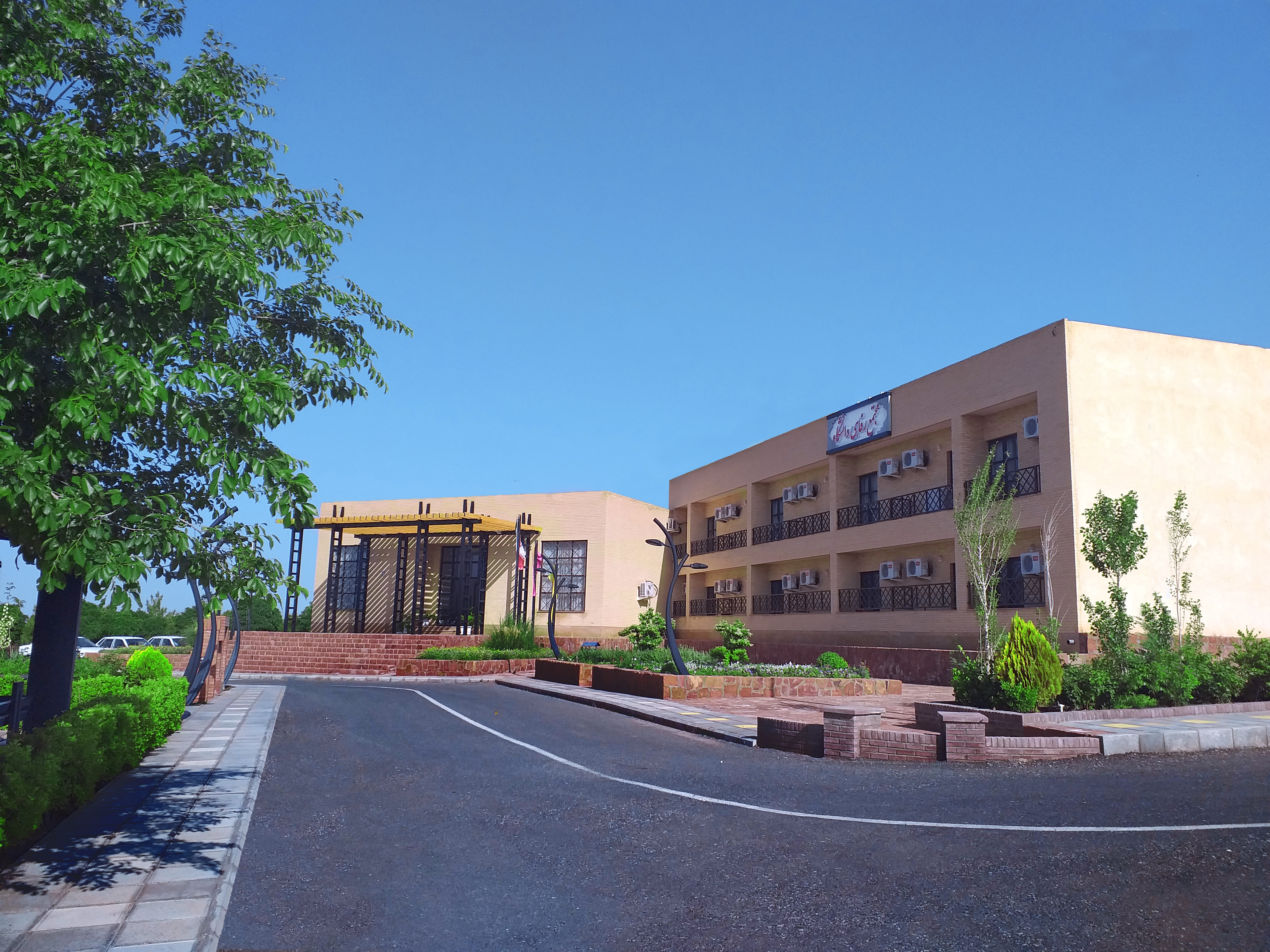 دانشگاه حکیم سبزواری-سبزوار